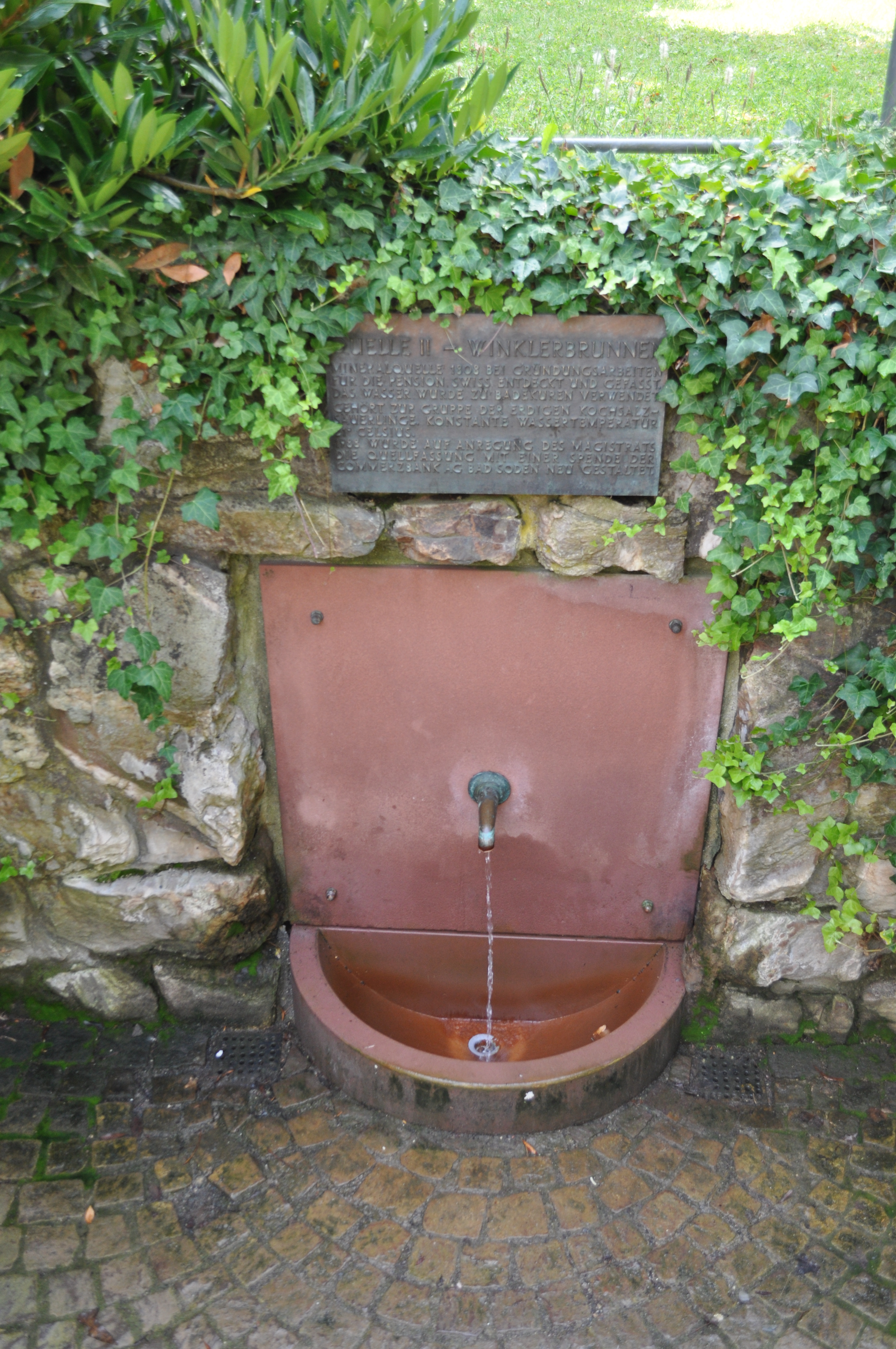 Winklerbrunnen im Wilhelmspark in Bad Soden am Taunus. Der Winklerbrunnen (Quelle Nr. II) am Eingang des Parks vom Franzensbader Platz wurde 1806 bei dem Bau einer Landvilla, der Pension Swiss, entdeckt. Der Brunnen ist nach den späteren Besitzern dieser Villa, der Familie Winkler, benannt. Im Rahmen der Parkgestaltung wurde das Haus 1910 abgerissen. Die Fassung des Brunnens stammt aus dem Jahr 1924. 1988 erfolgte eine Neugestaltung. Bei dem Wasser handelt es sich um einen Natrium-Chlorid-Hydrogencarbonat-Thermalsäuerling.